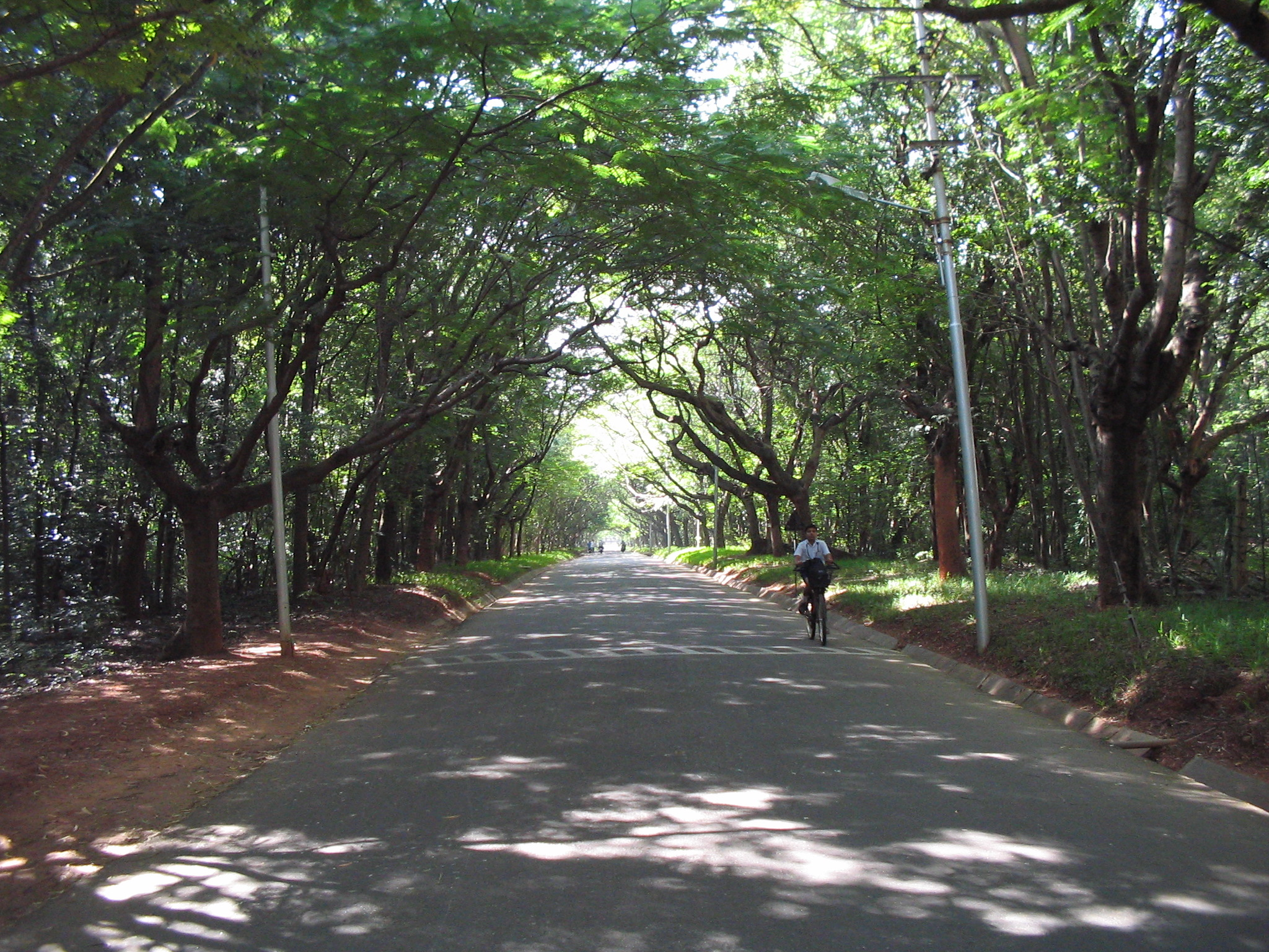 ഇന്ത്യൻ ഇൻസ്റ്റിറ്റ്യൂട്ട് ഓഫ് സയൻസിലെ പ്രധാന പാതകളിലൊന്നായ ഗു‌ൽമൊഹർ മാർഗ്ഗ്